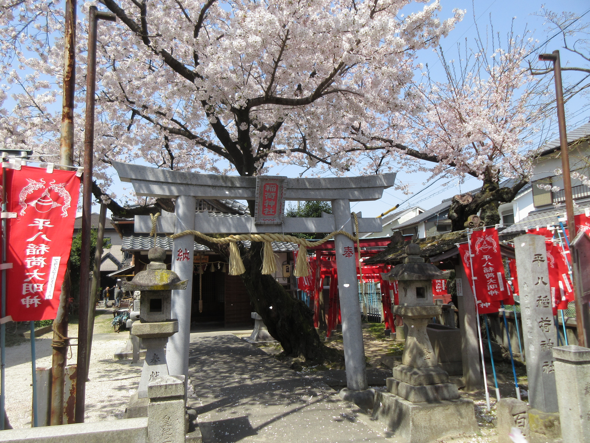 平八稲荷神社（岡崎市元能見町）